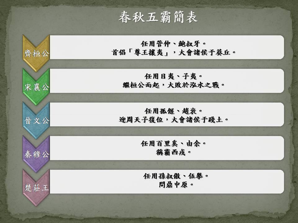 春秋五霸簡表